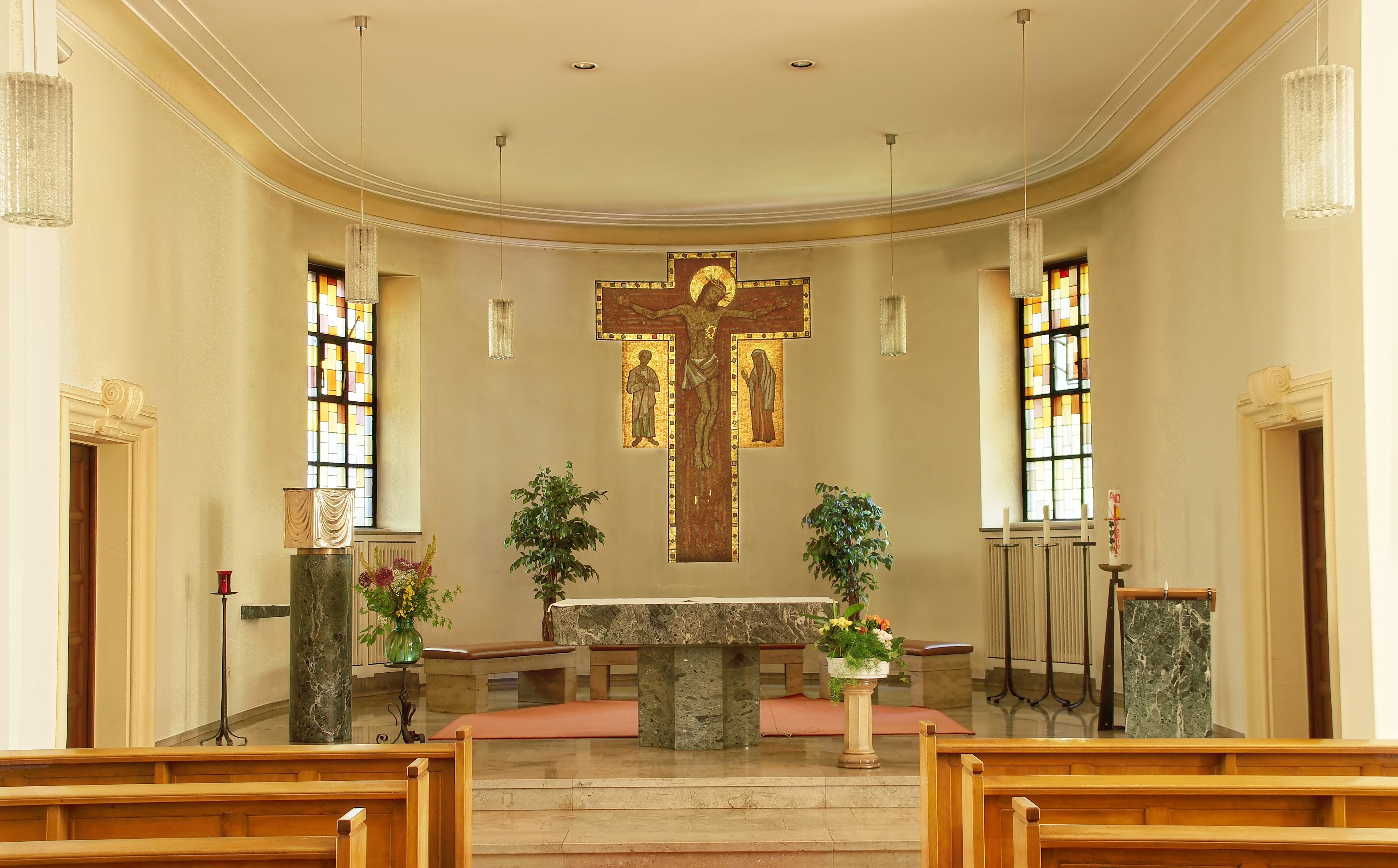 DasHerz-Jesu-Kloster Altarraum